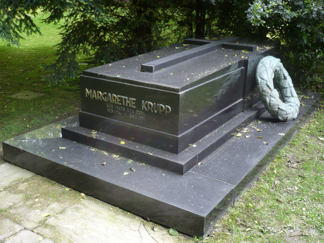 Grabmal von Margarethe Krupp geb. Freiin von Ende auf dem Friedhof Bredeney in Essen